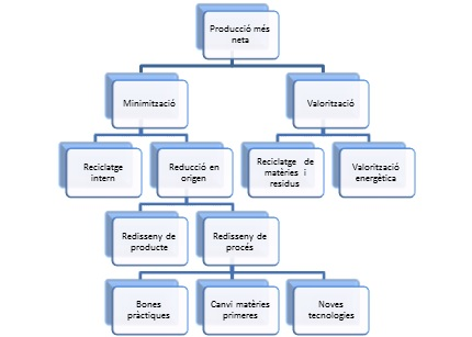 Gràfic que reflecteix les característiques pròpies d'una estratègia integrada de prevenció ambiental, com és la producció més neta.